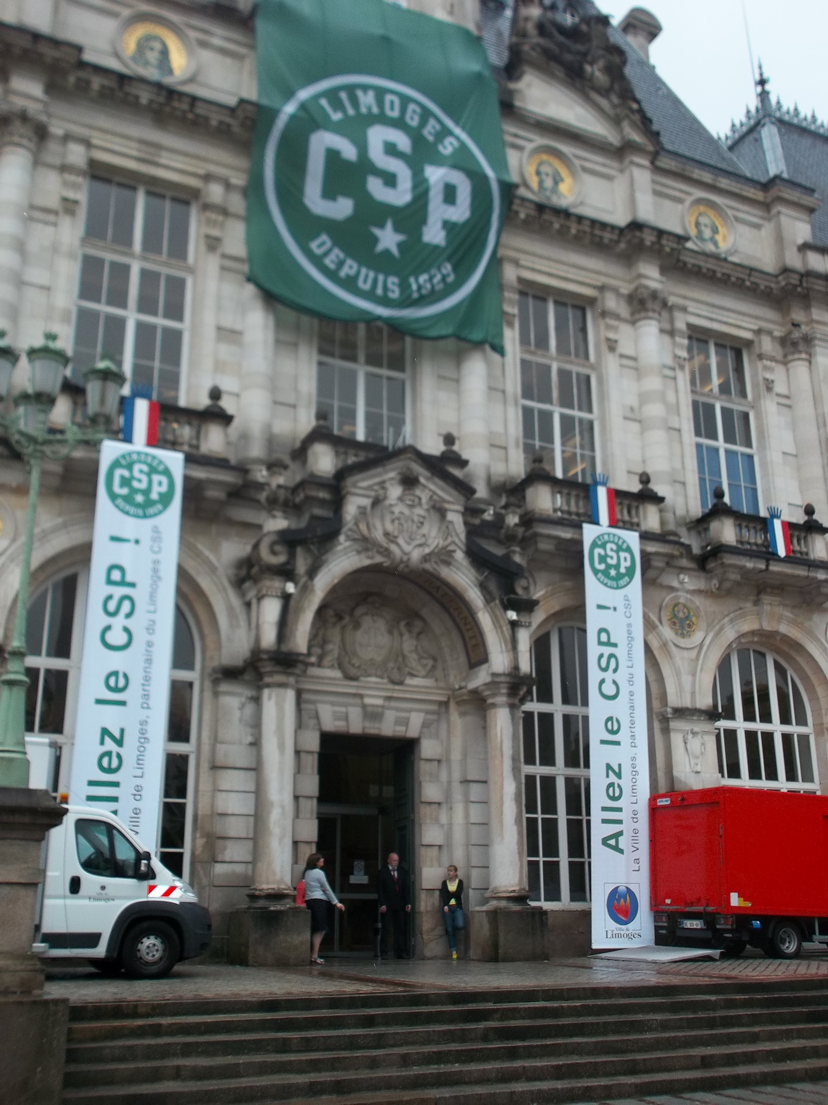 2014-2015, 10 juin 2015, La Municipalité s'habille aux couleurs du Limoges CSP